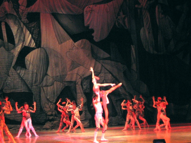 Творческий вечер М.Вежновец и Ю.Ковалёва. "Болеро"